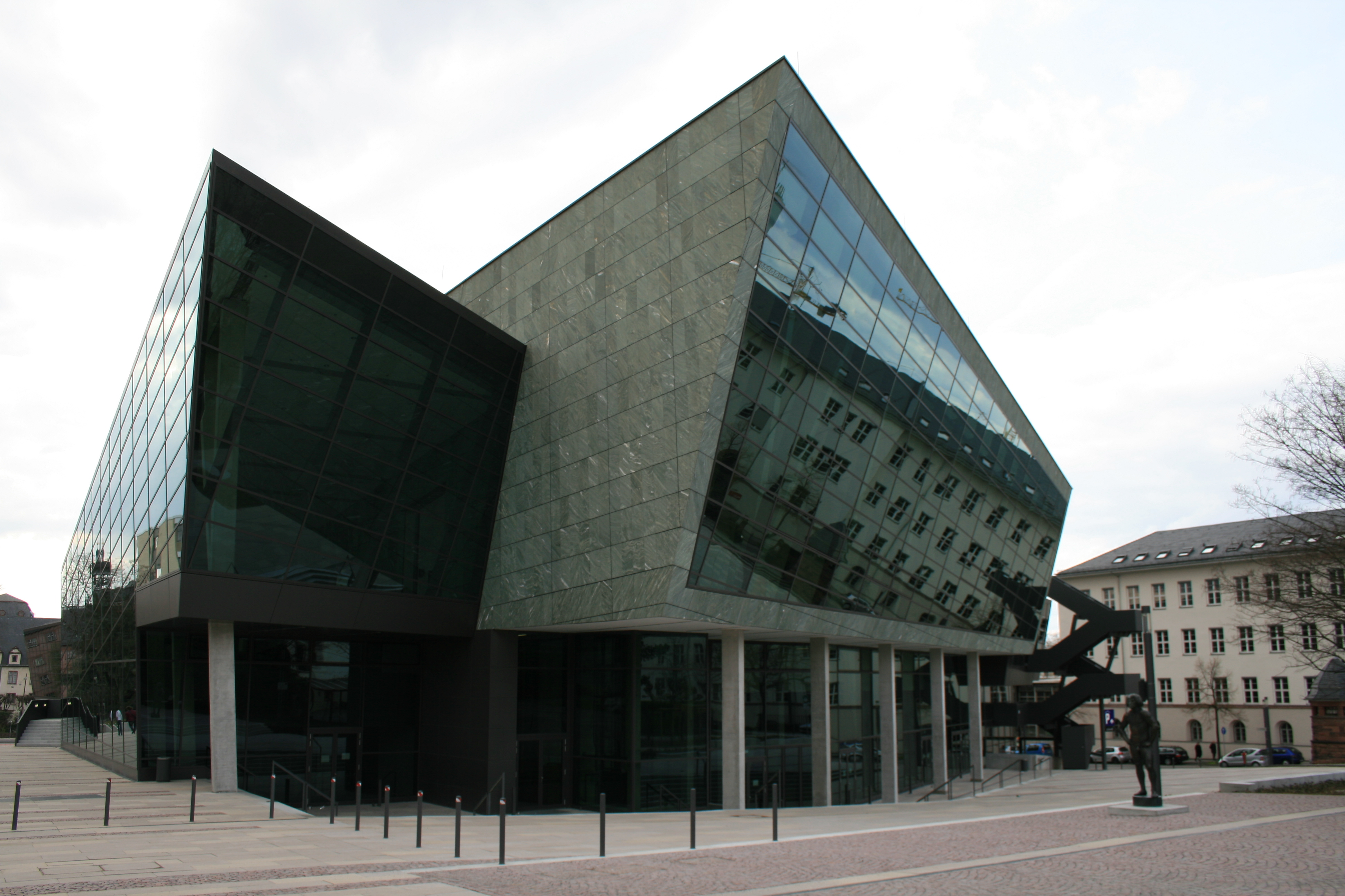 darmstadtium (Kongresszentrum) in Darmstadt - Rückseite